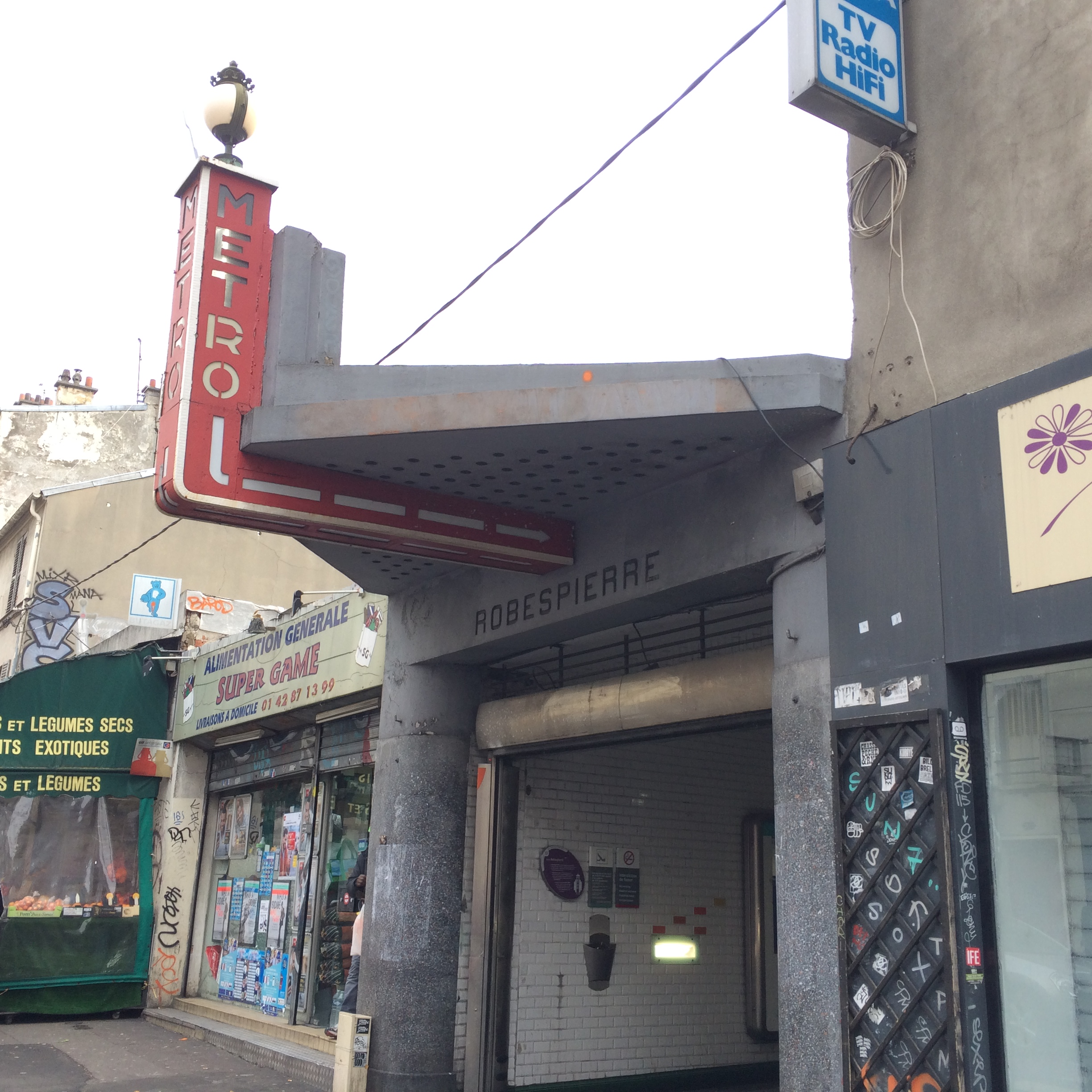 Une des deux entrées de la station de métro Robespierre rue de Paris à Montreuil.